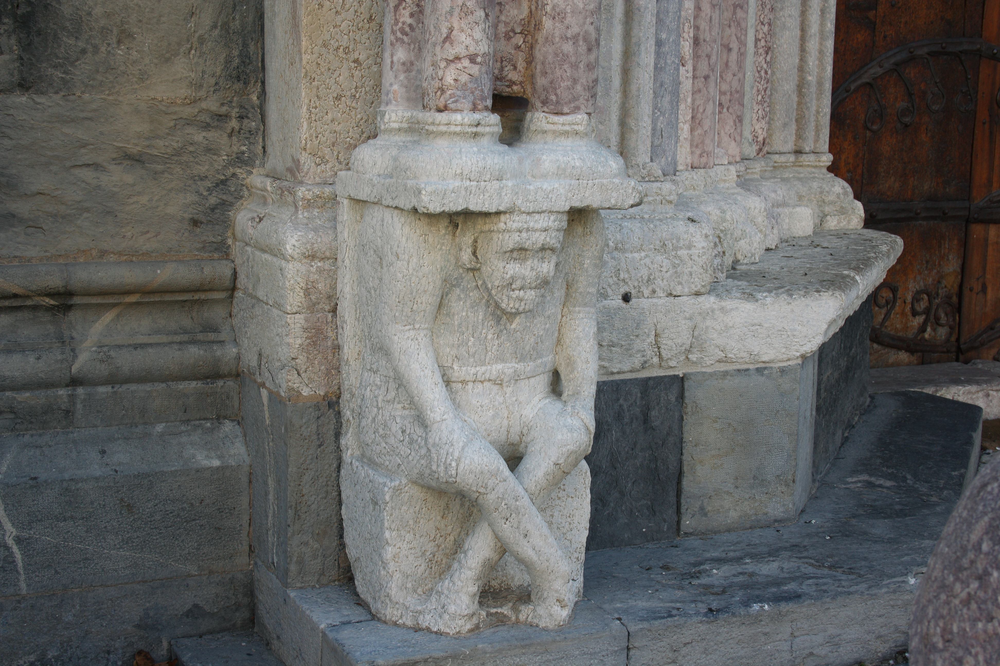 Ehemalige Kathedrale Notre-Dame in Embrun, einer Gemeinde im Département Hautes-Alpes in der französischen Region Provence-Alpes-Côte d'Azur, Skulptur am Nordportal Le Réal, Darstellung: Atlant